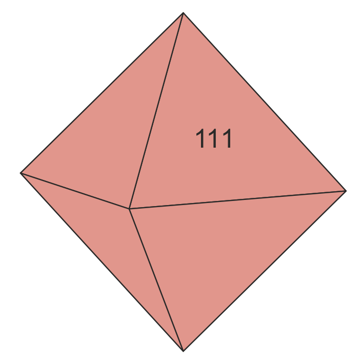 Zeichnung eines Hydroxymanganopyrochlor-Kristalls mit dem Oktaeder {111} als einziger Flächenform